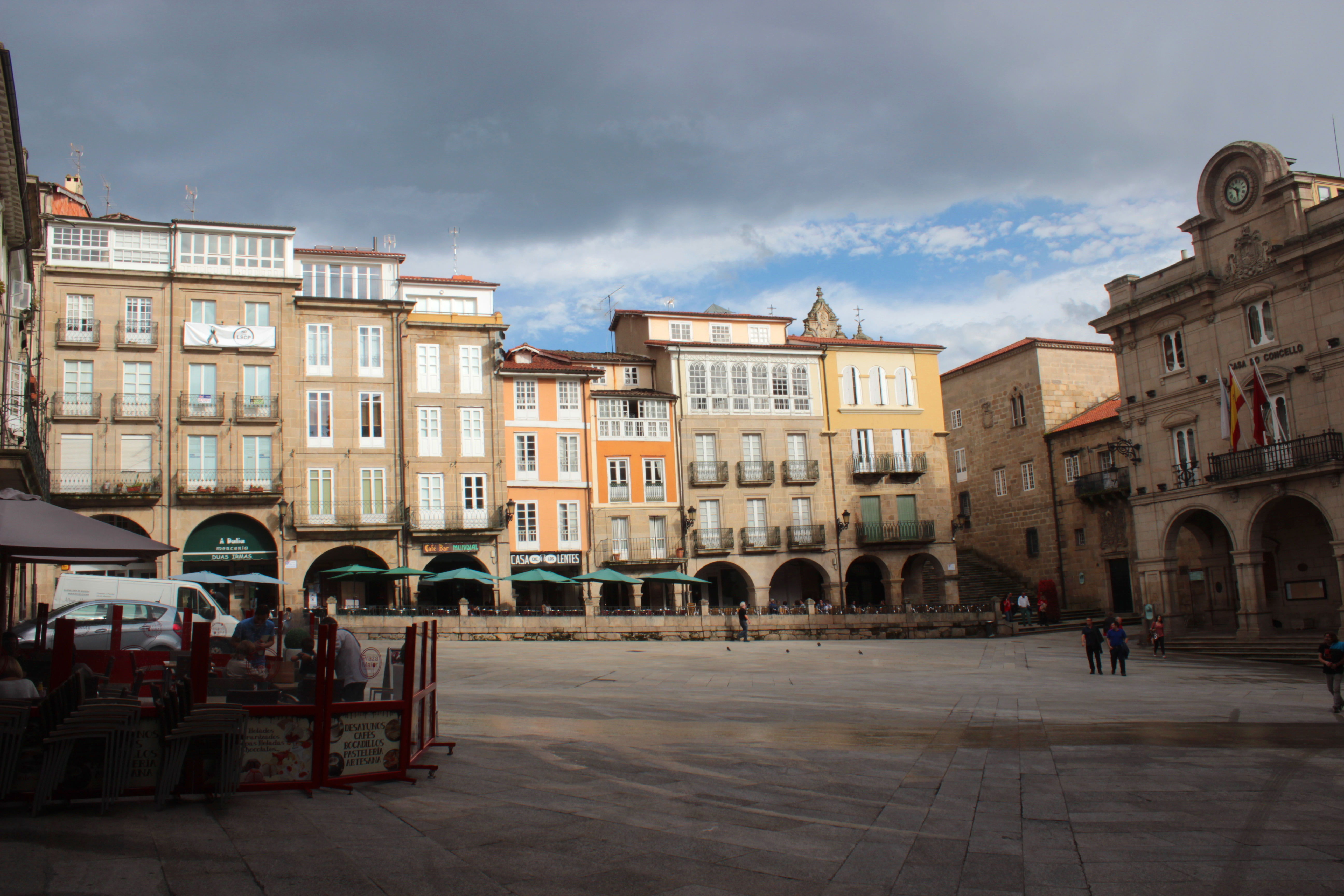 Orense